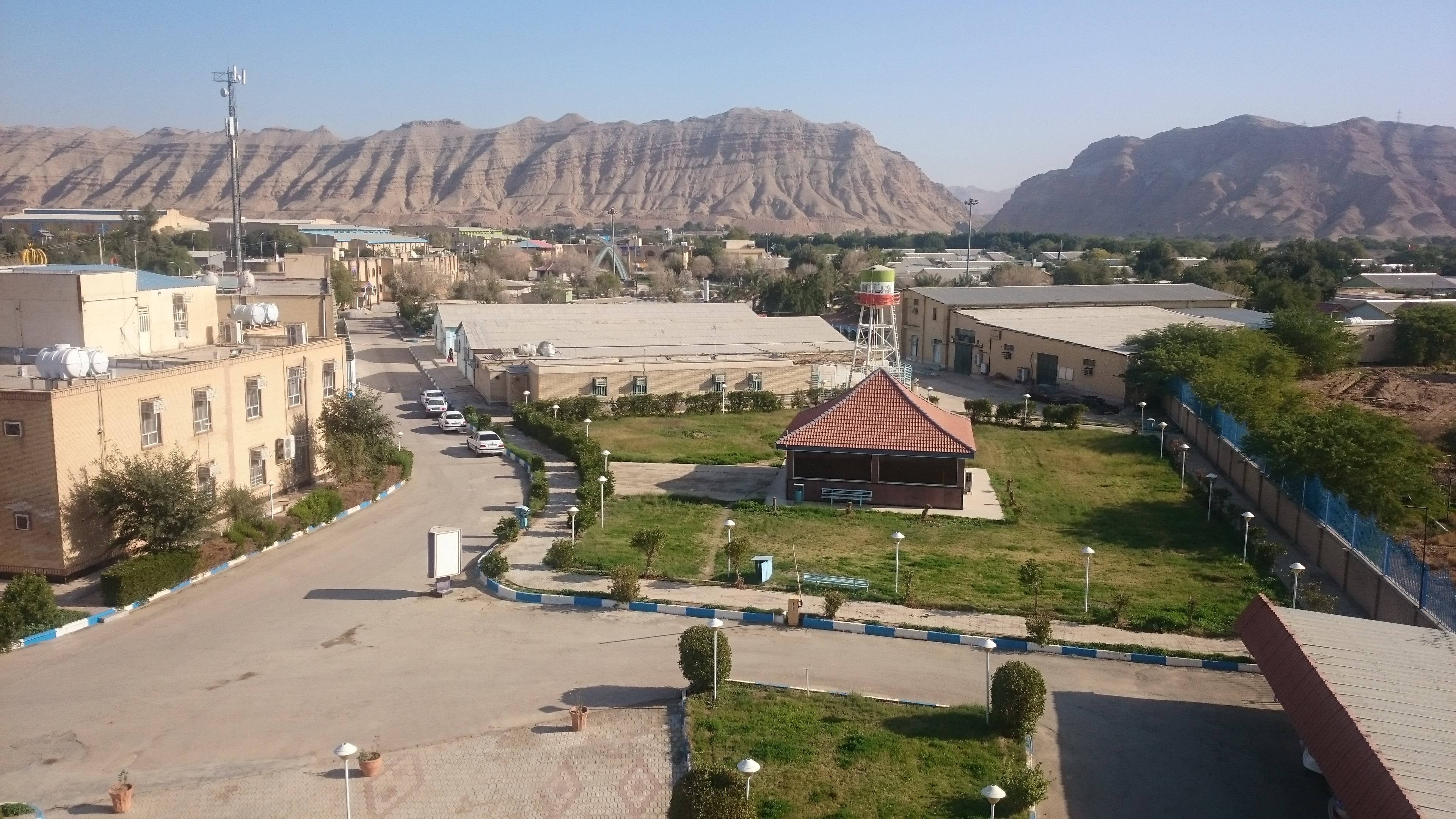 نمایی کلی از دانشگاه آزاد اسلامی واحد امیدیه